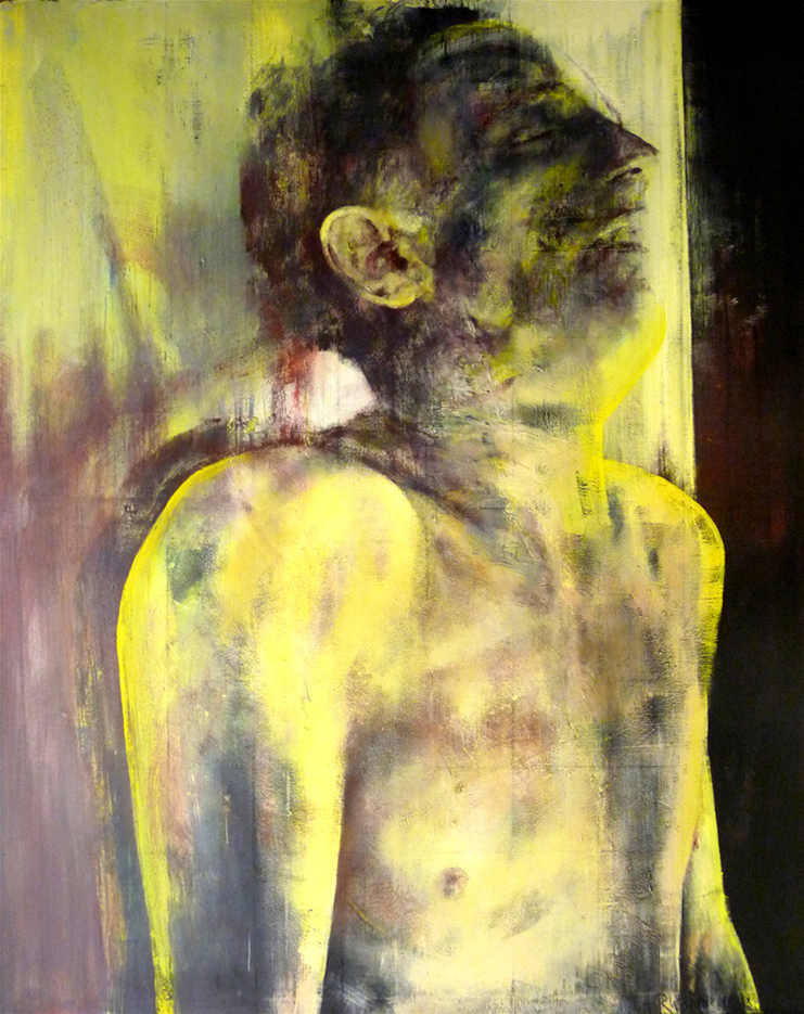 Heike Ruschmeyer, Monolog XXVIII, 1988, Kunstharz, Eitempera und Ölfarbe auf Nessel, 240 x 190 cm